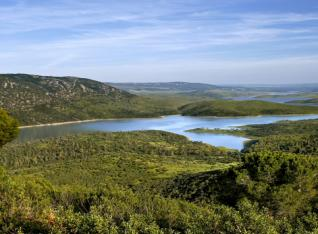 Embalse de Cíjara